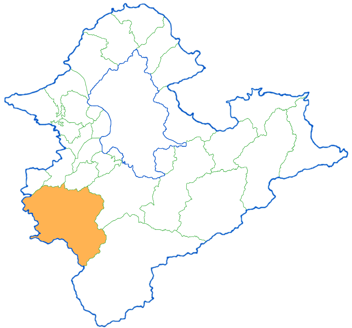 臺灣省臺北縣三峽鎮，KaurJmeb於2005年2月6日為編寫臺北縣三峽鎮所繪。